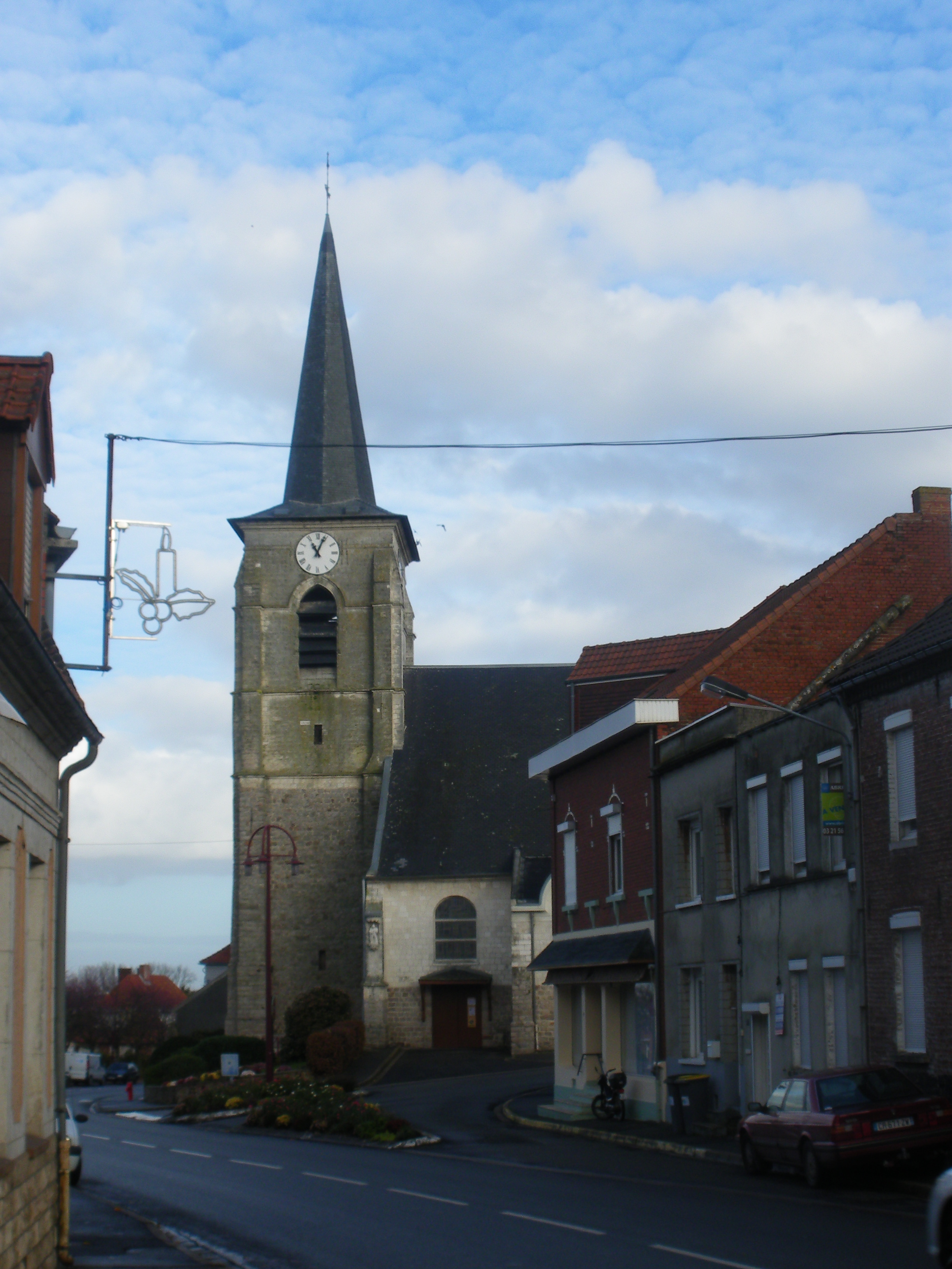 Vue de l'église Saint-Martin d'Hersin-Coupigny.